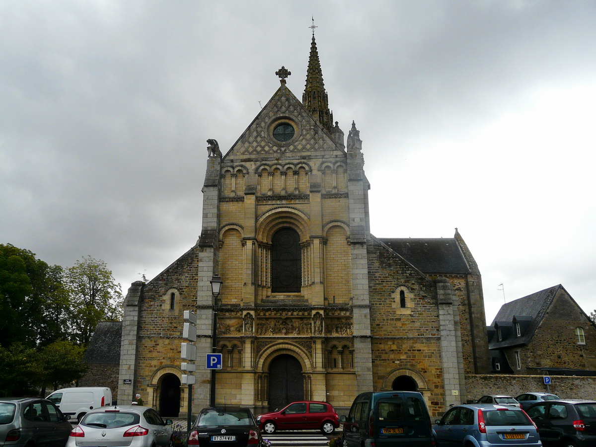 Basilique Notre-Dame d'Avesnières, Laval, France